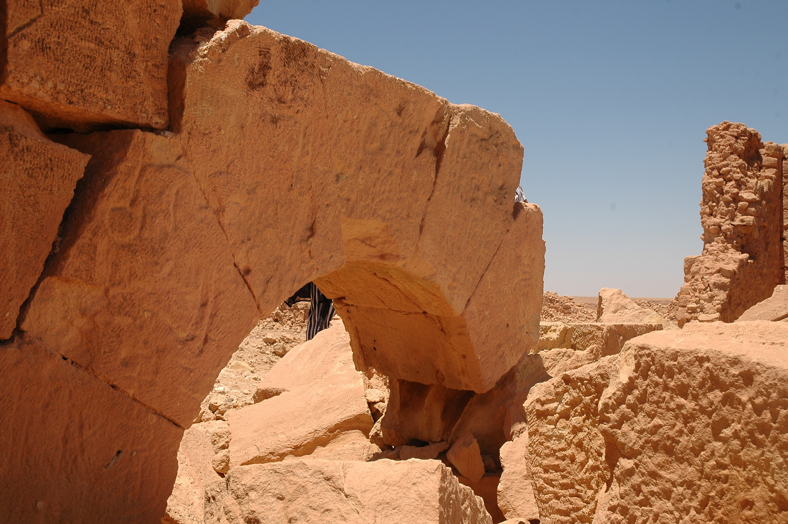 Kastell Gheriat el-Garbia - Der südöstliche Zugang der Porta praetoria. Wie auf den Seiten von ersichtlich wurden Aufnahmen von dieser Reise erstmals 2006 veröffentlicht. Das Foto zeigt den Zustand vor dem Beginn der Ausgrabungen 2009 unter der Leitung von Michael Mackensen.